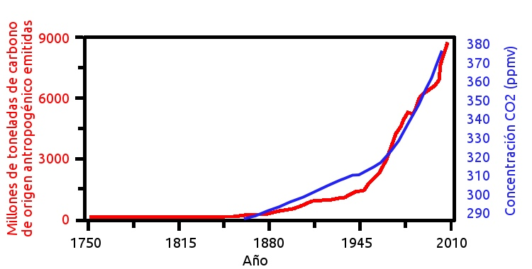 Evolución de la concentración de dióxido de carbono desde 1750 a 2010 y su relación con la emisión de carbono de origen antropogénico debido a la quema de combustibles fósiles, deforestación y fabricación de cemento.